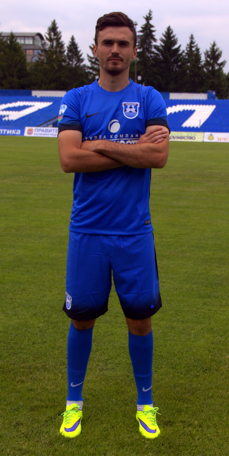 artyom-serduk